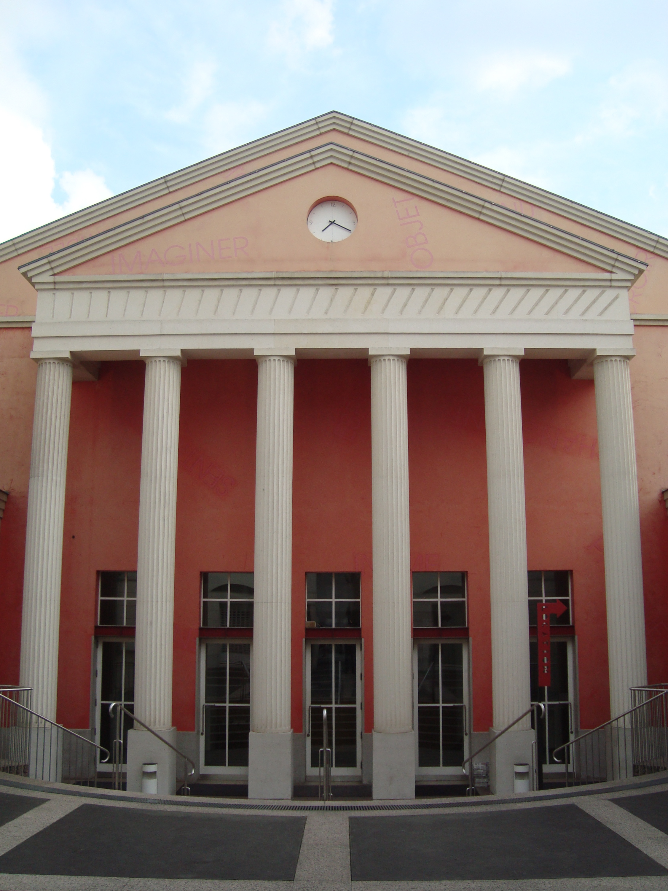 Théâtre des Abbesses - Théâtre de la Ville à Paris, rue des Abbesses